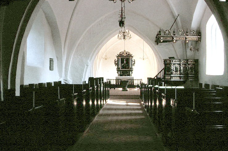 Brenderup Kirke i Danmark. Skibet set mod øst